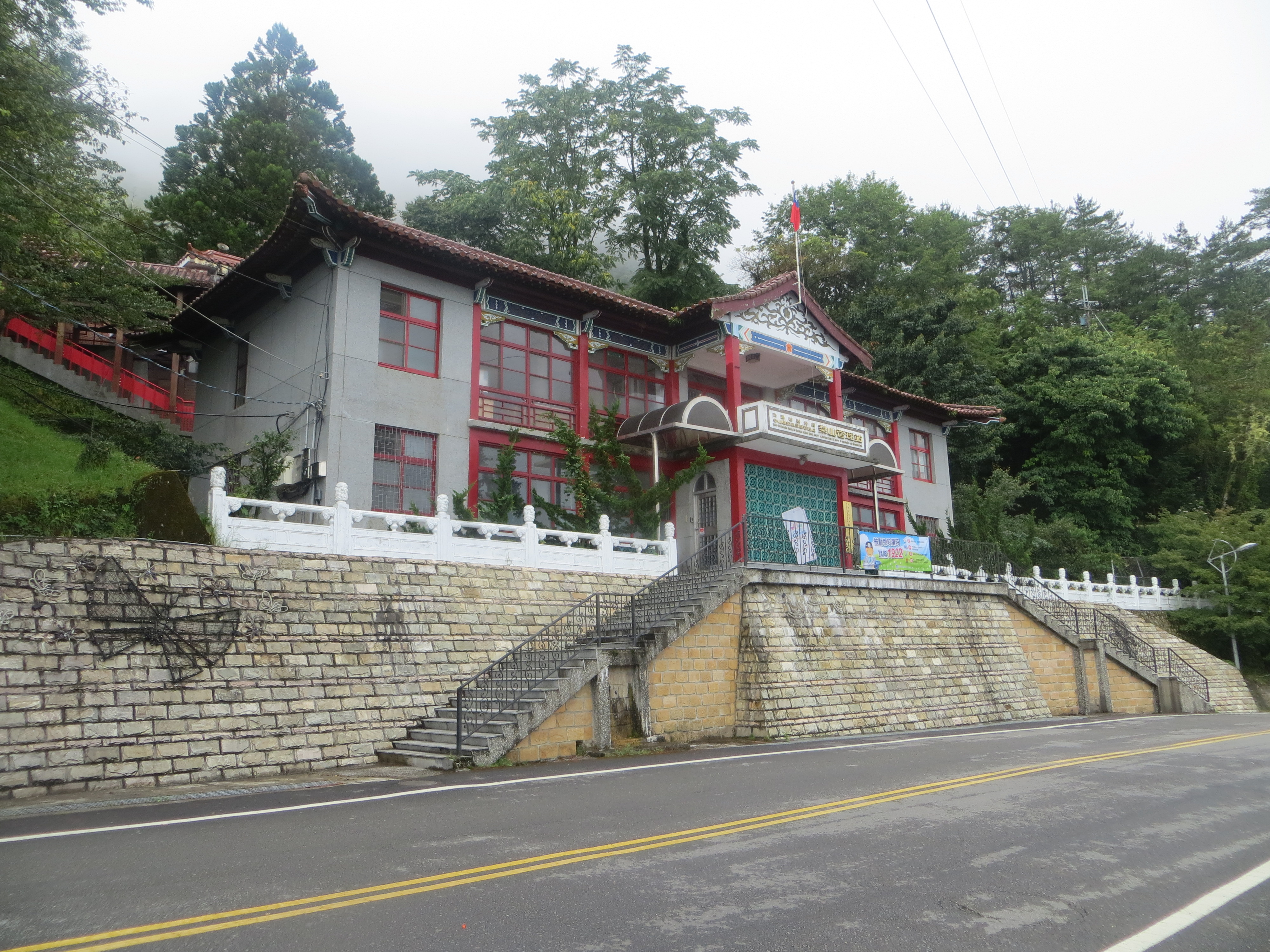 梨山風景區管理站比鄰台8線，前身是梨山建設管理局廳舍；現隸屬於交通部觀光局參山國家風景區管理處。